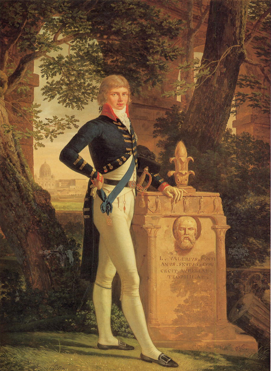 Vente Christie's Monaco 1986